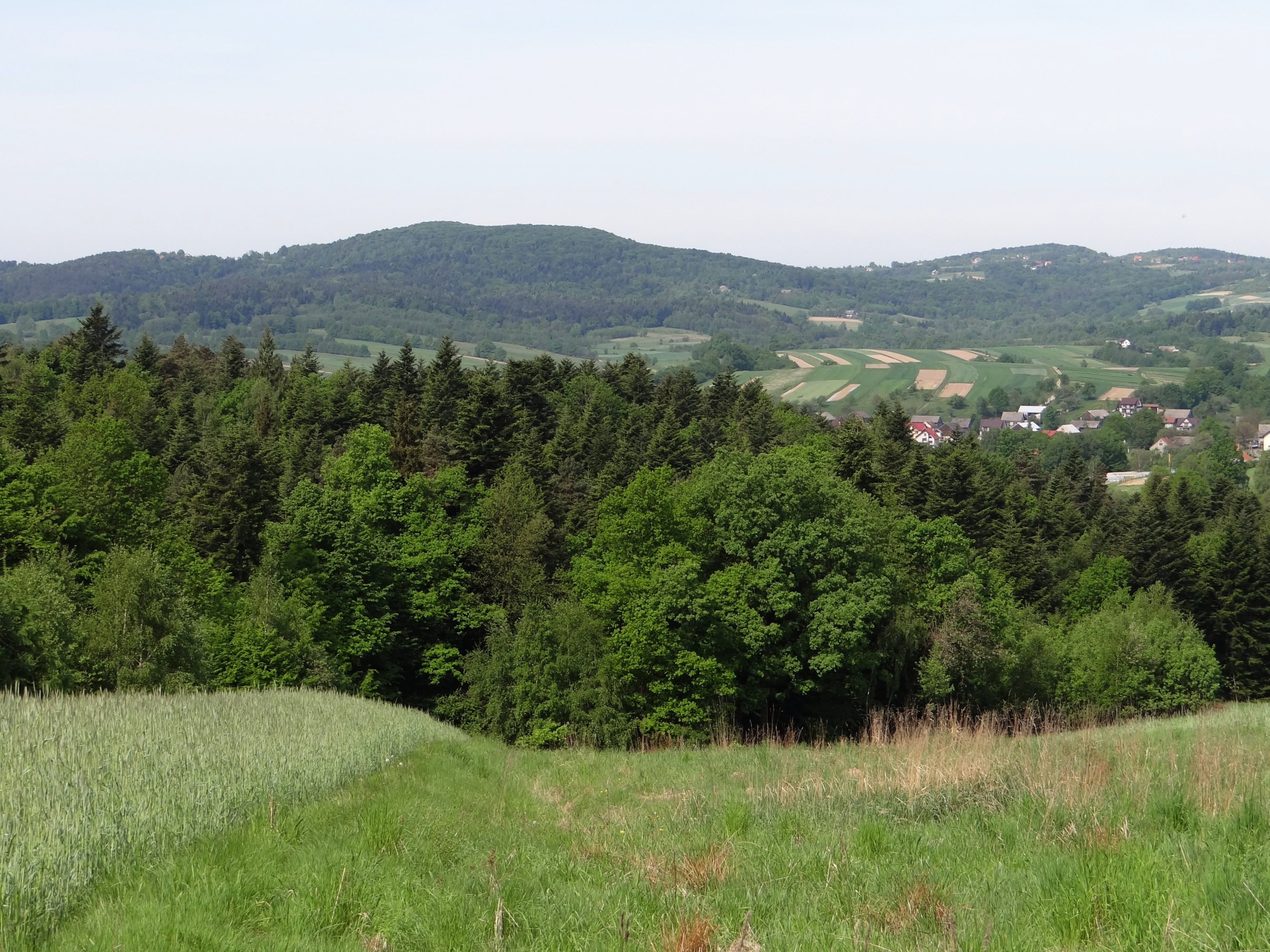 Wzgórze Wichras. widok z szosy przez Leksandrową